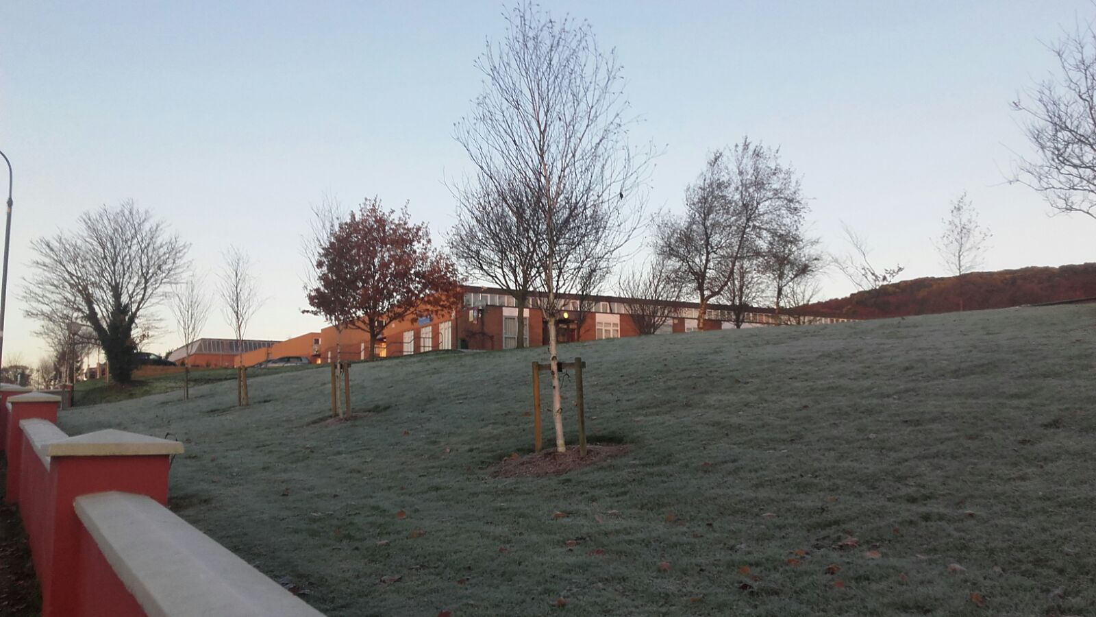 An Scoil Chuimsitheach, Tairbeart, Co. Chiarraí